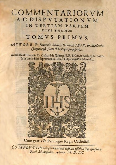 Portada del libro Commentariorum ac disputationum in tertiam partem divi Thomae (tomo I). Publicado en latín por Francisco Suárez en Alcalá de Henares, en 1590.